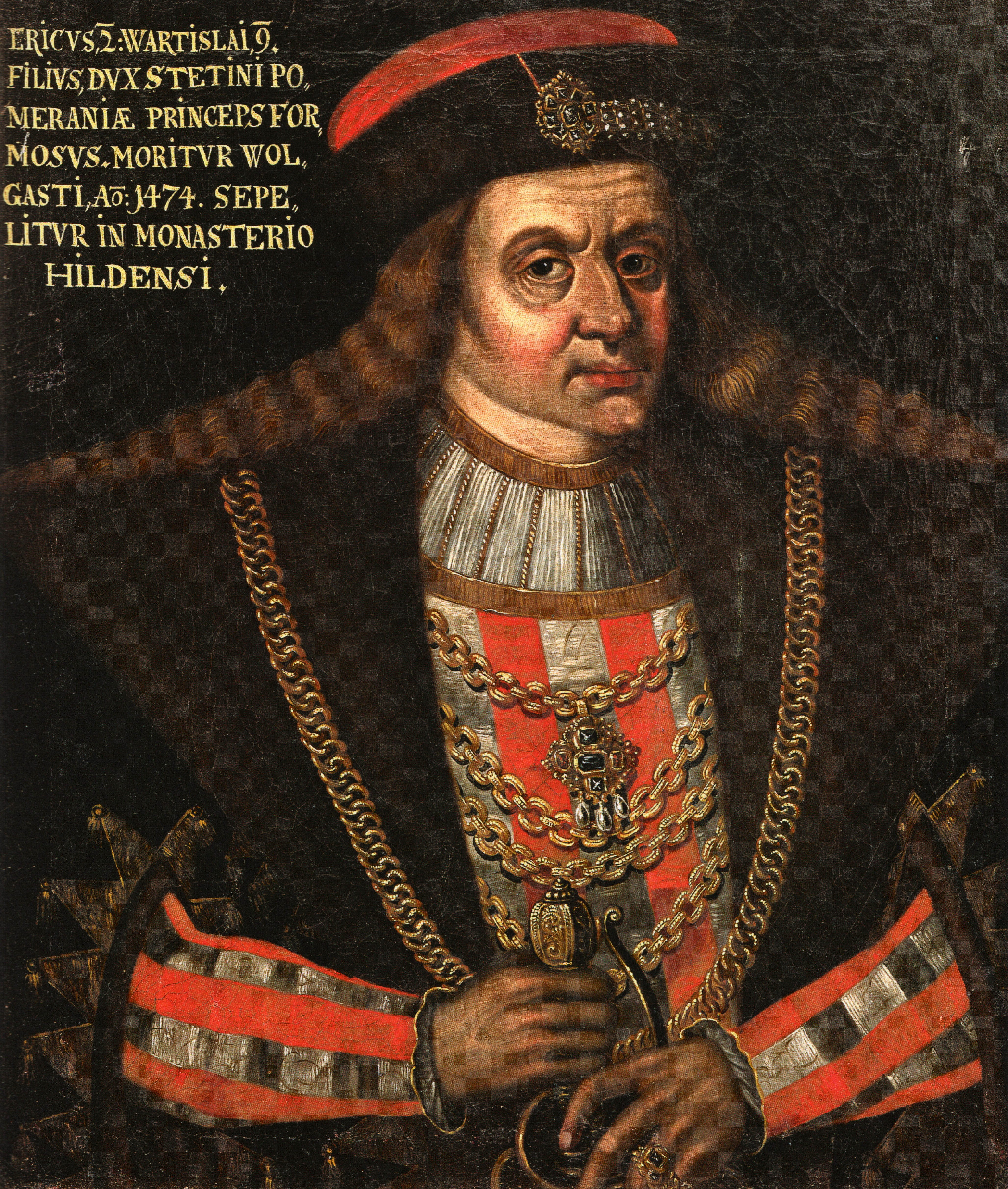 Kopie nach einer Vorlage aus dem Alten Rathaus in Anklam; Brustbild.